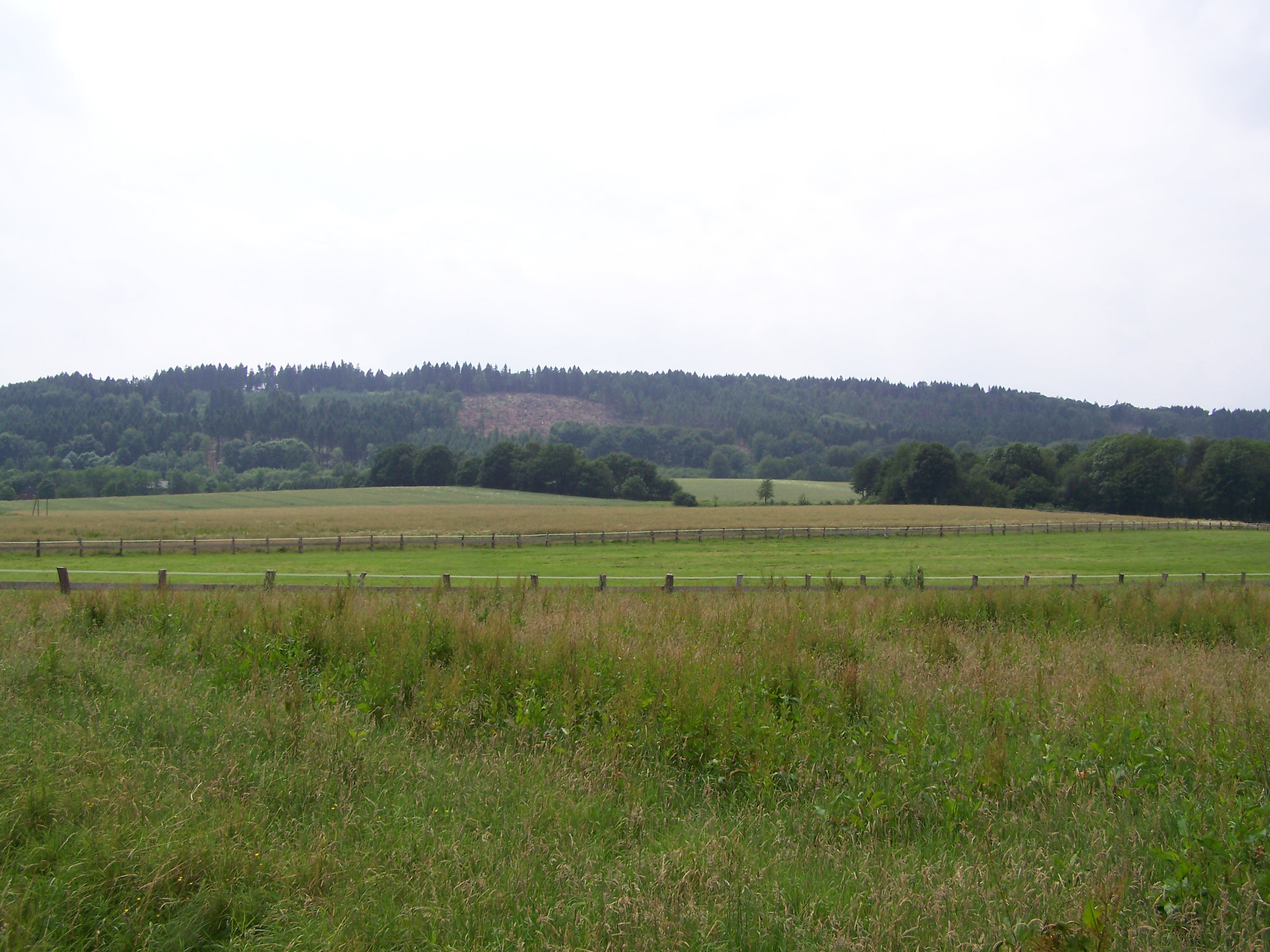 Foto vom Nordhang des Hüggels. Von Ohrbeck aus gesehen.